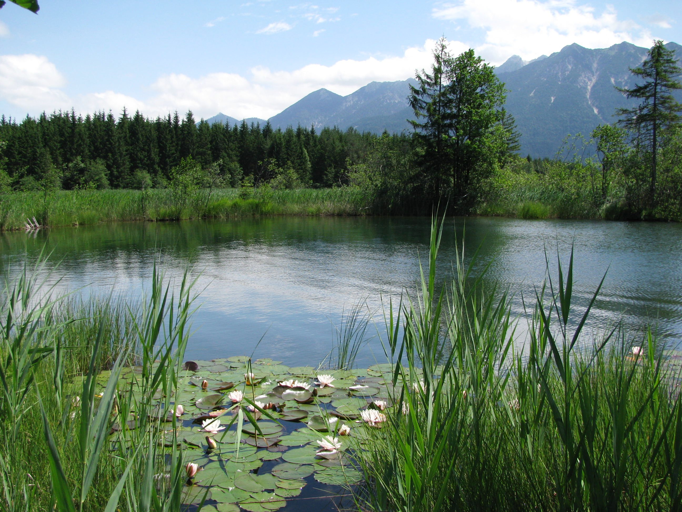 Barmsee im Bereich des Badeplatzes am Nordwestufer und Berge des Karwendelgebirges.